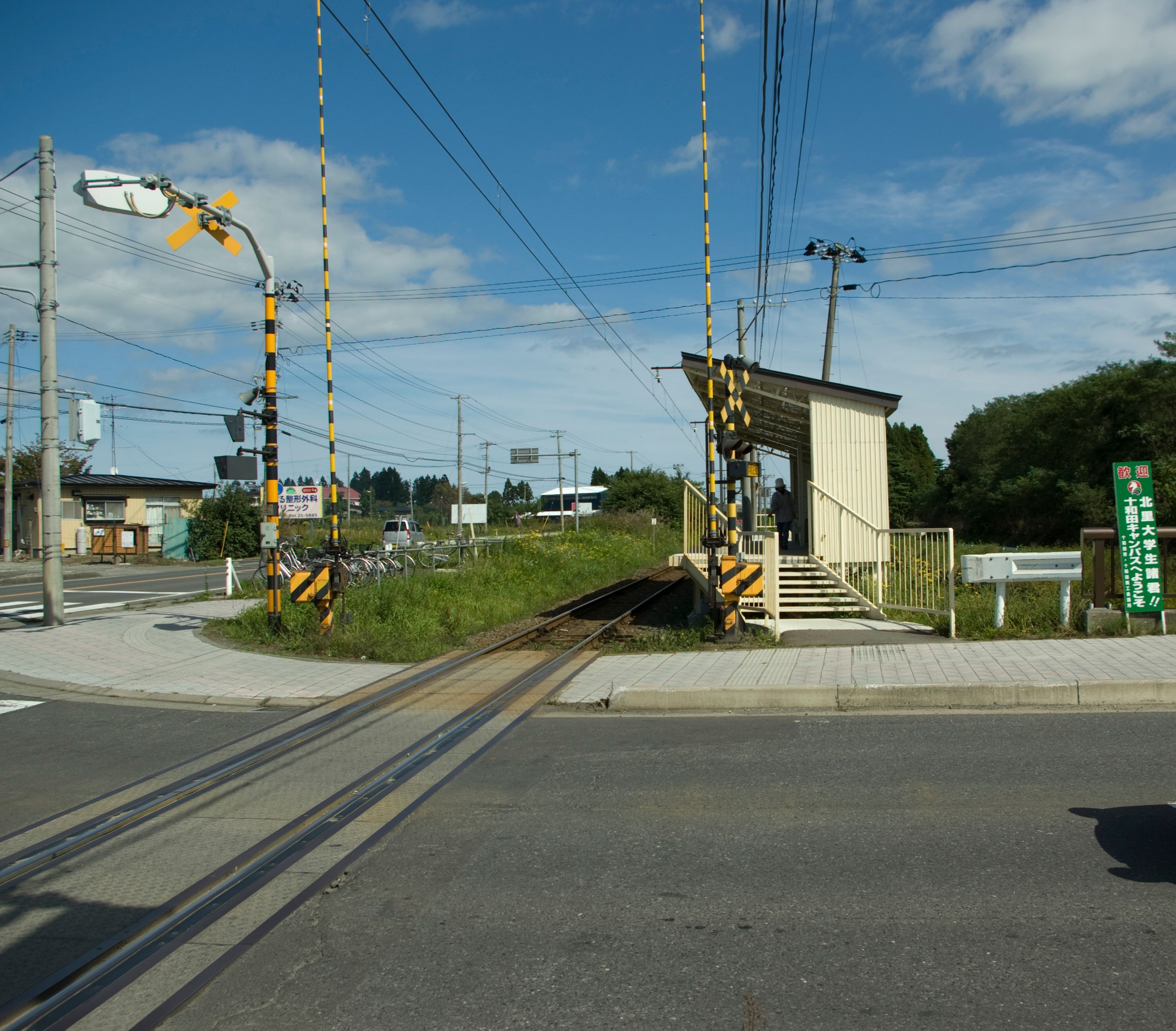 十和田観光電鉄北島大学前駅